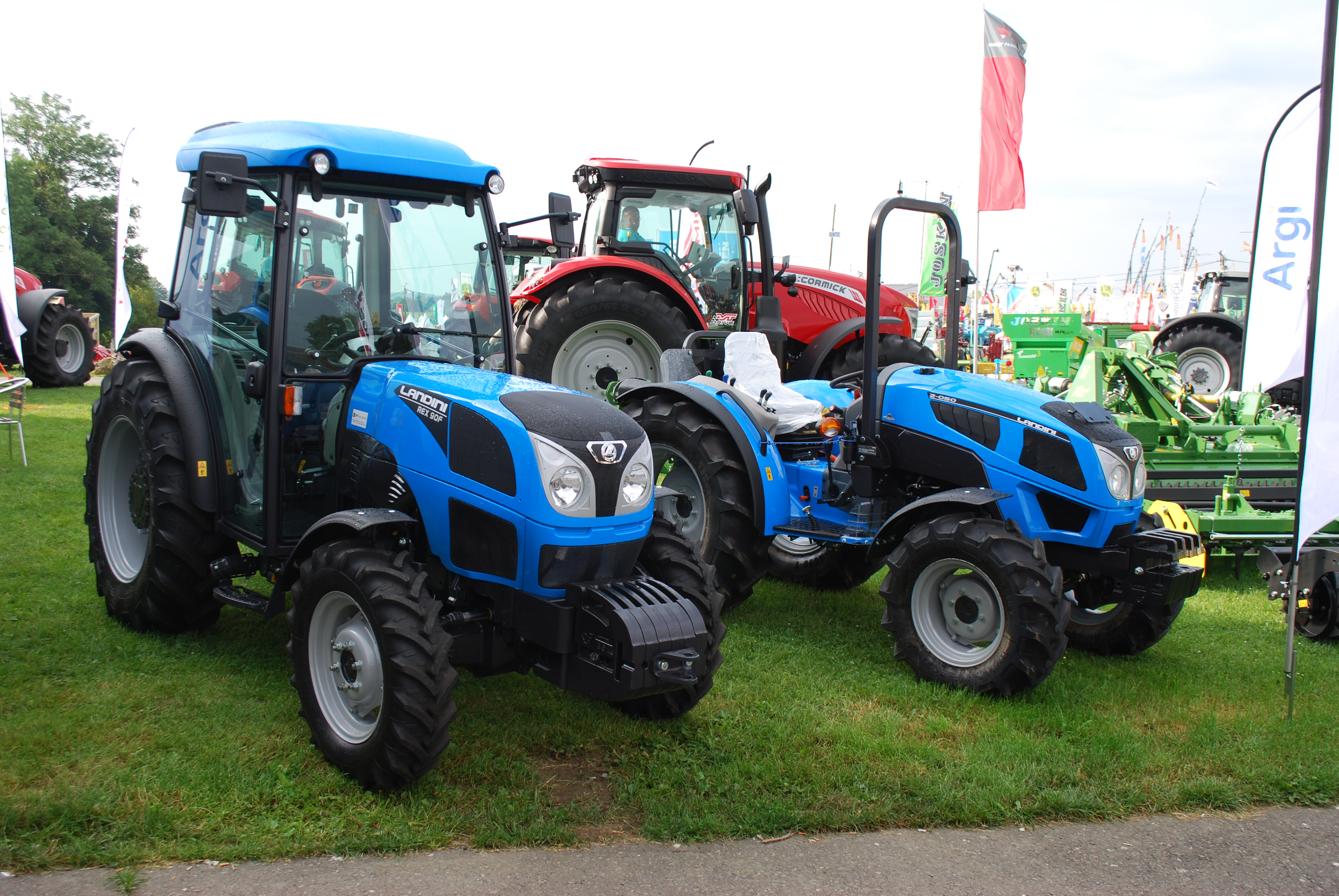 Vue de la Foire agricole de Libramont, dans le Luxembourg belge (82e édition en 2016).